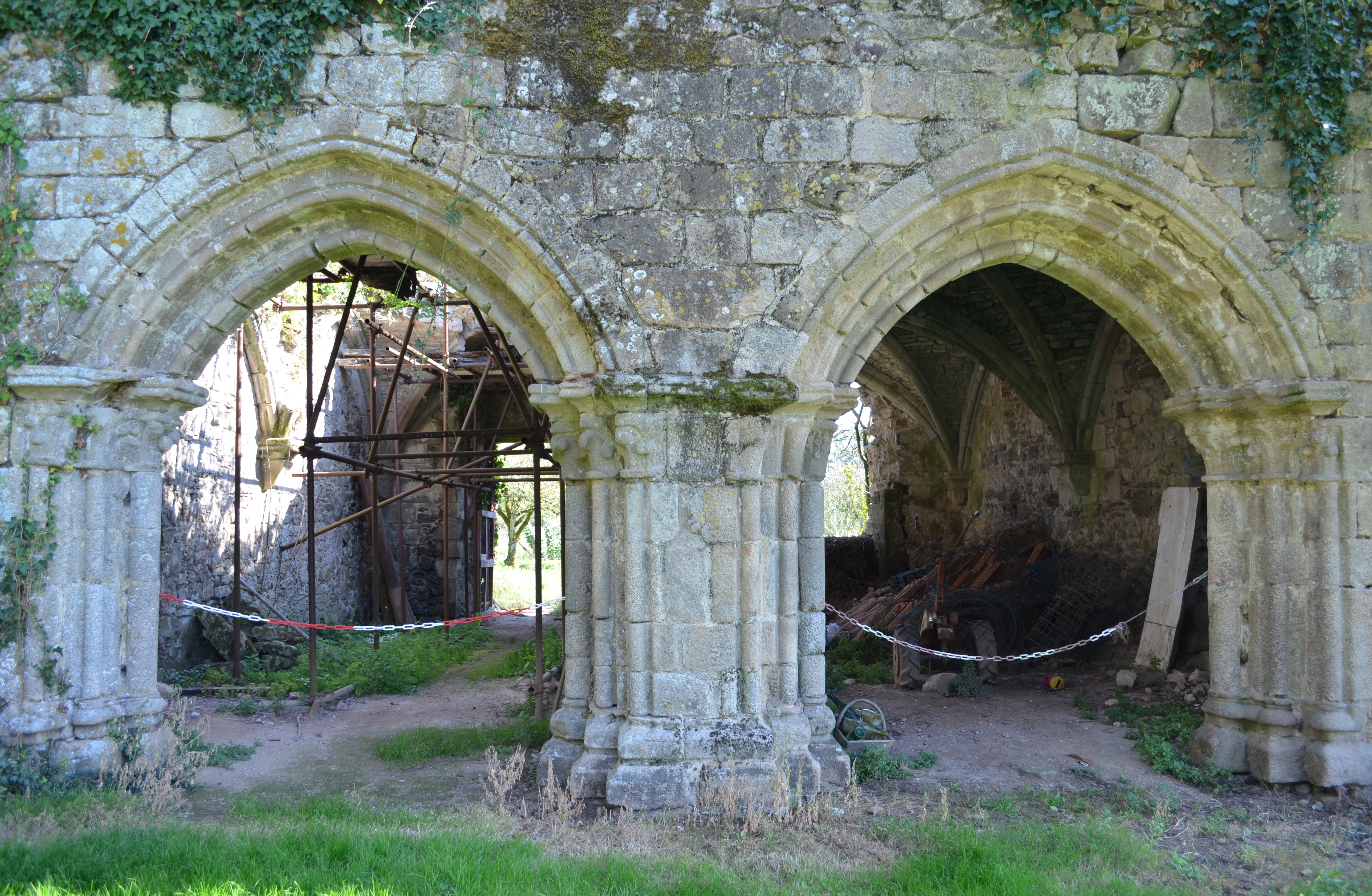 Ancienne abbaye des Fontenelles (13e s. ; 15e s.) - Saint André D'Ornay, La Roche-sur-Yon .